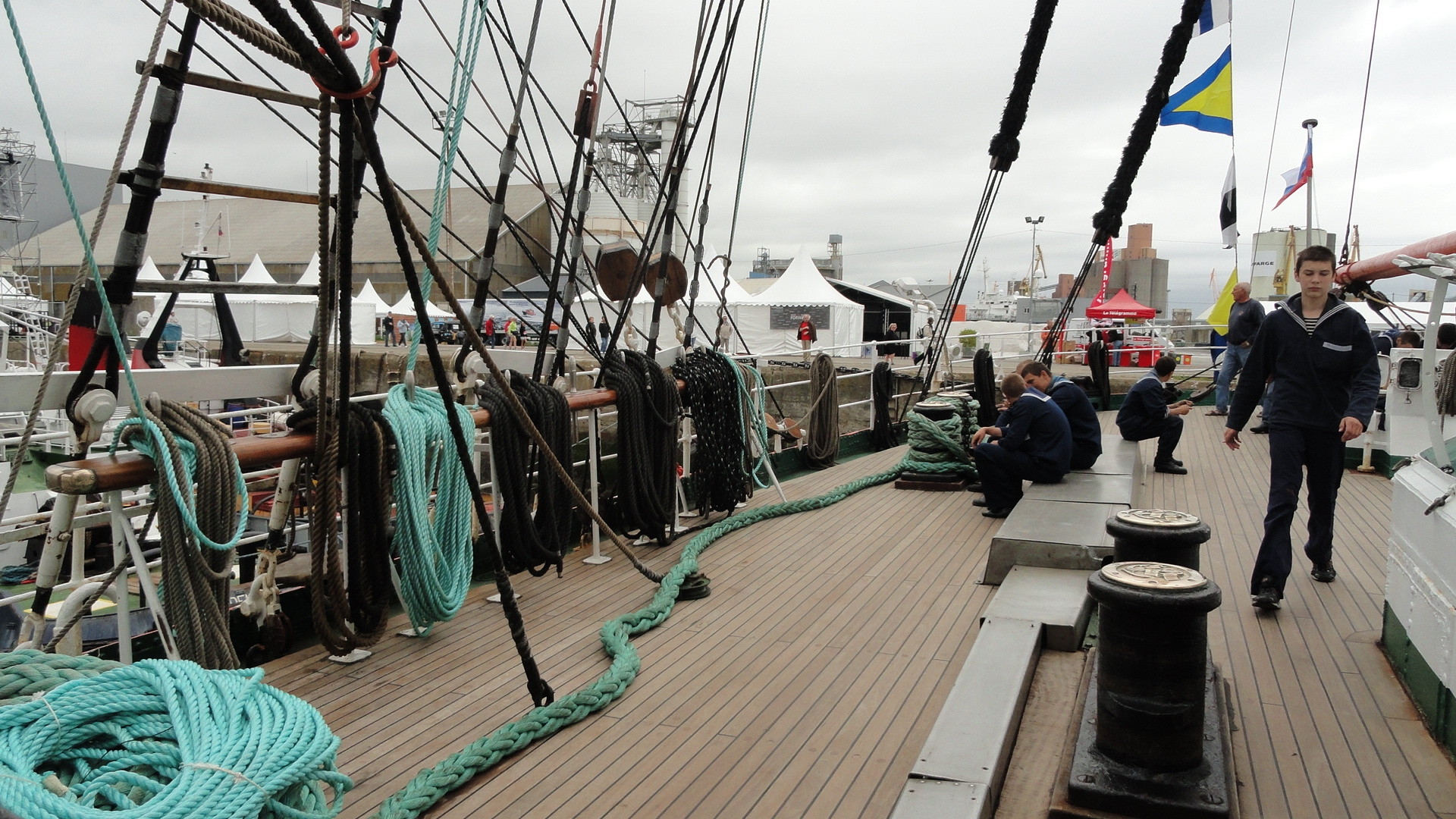 Visite à bord du Sedov lors des Tonnerres de Brest 2012